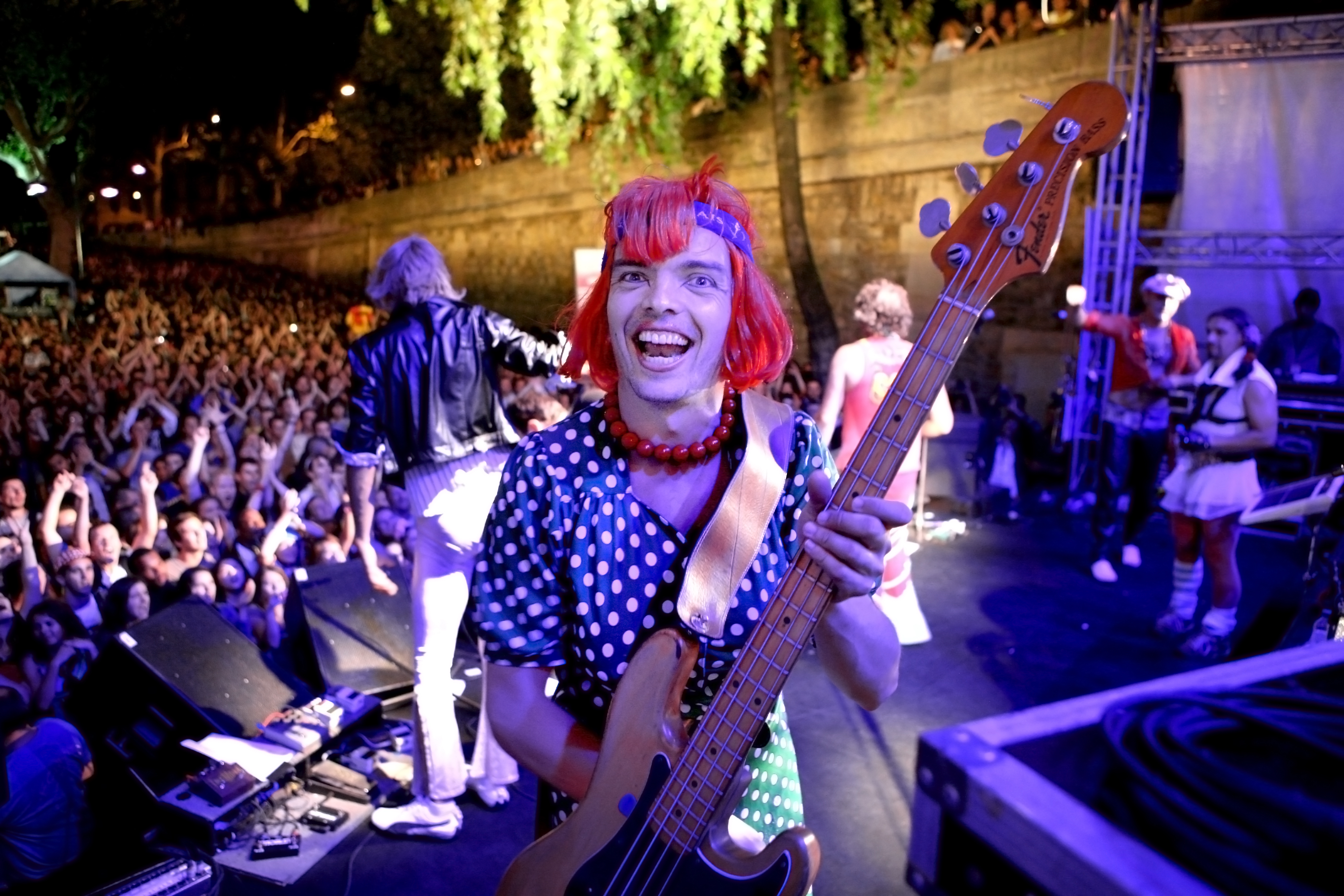 Marcel et son Orchestre in Paris Plage at Festival Fnac Indétendances.